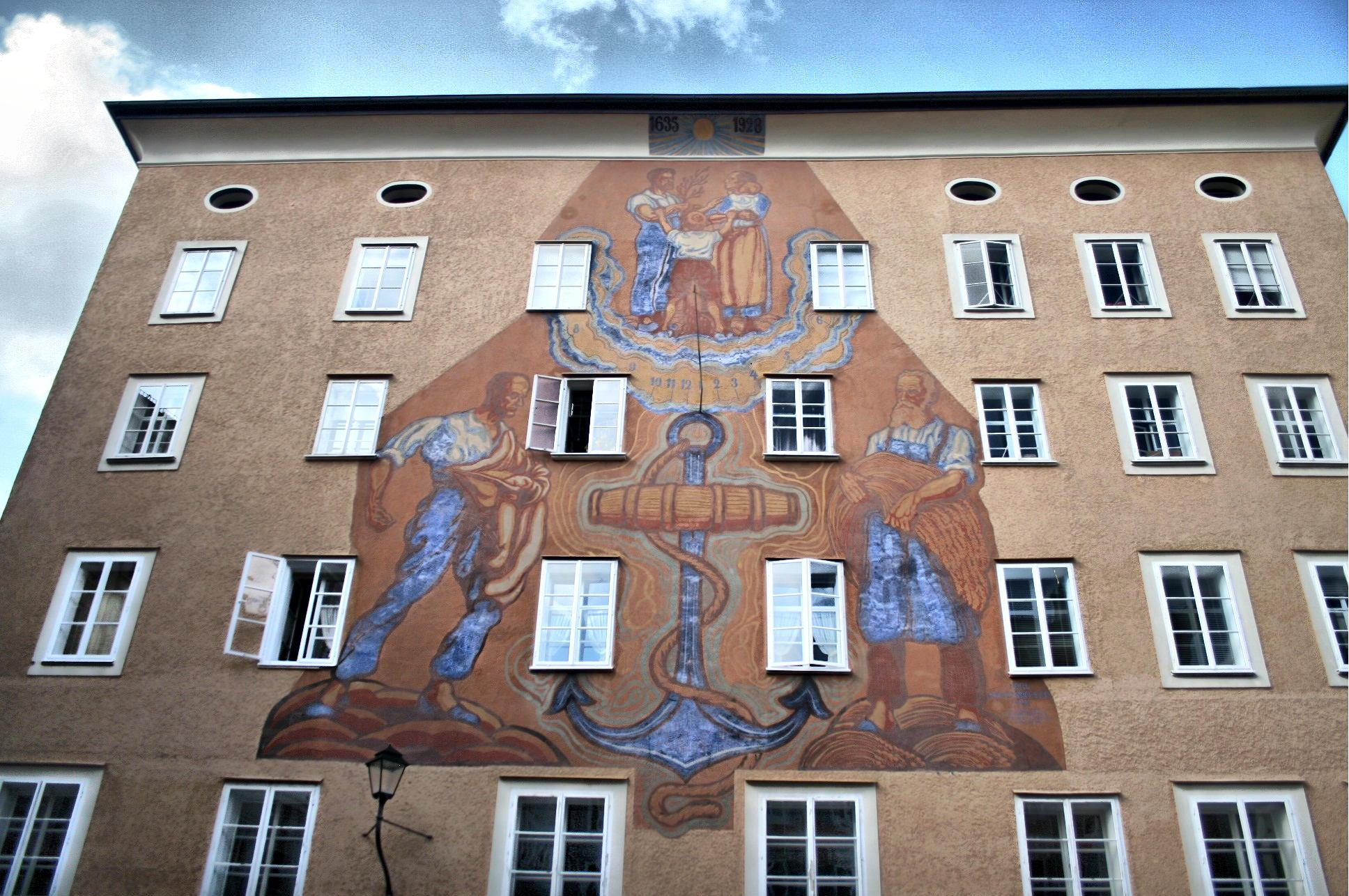 Wohn- und Geschäftshaus, Gerichtshaus oder Stadt-Trinkstube. Wandmalerei von Karl Reisenbichler aus dem Jahre 1928 für die Versicherung Der Anker.